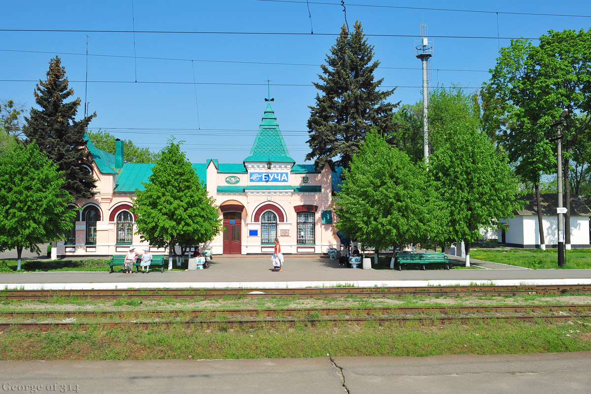 Залізничний вокзал станції Буча